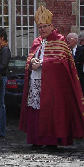 Mgr. Vangheluwe, bloedprocessie